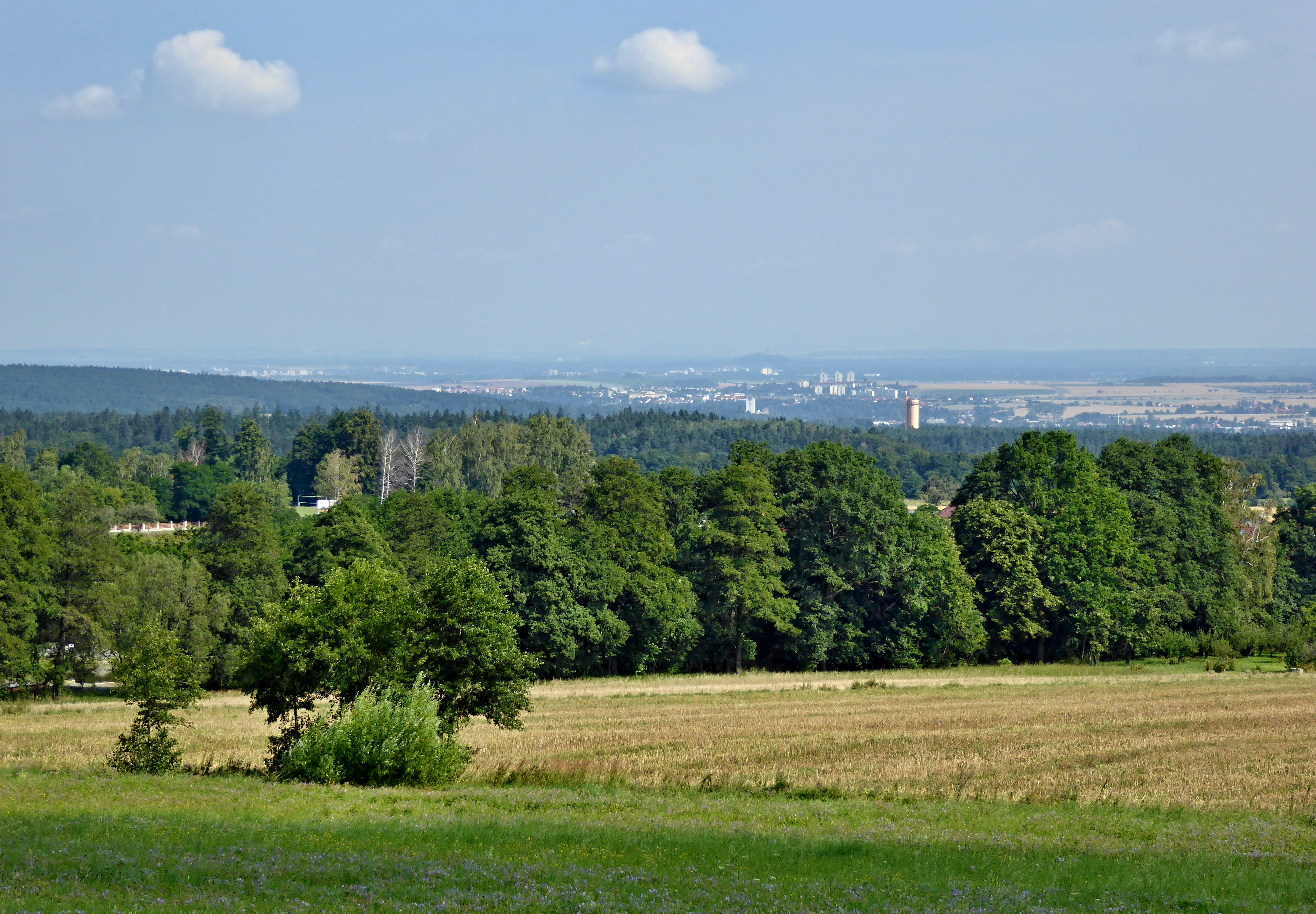 Severní svahy vrcholové části Ochozu (520 m n.m.) nad stejnojmennou obcí u Nasavrk poskytují výhled do značné části Pardubického kraje severním a částečně až východním směrem. Dobře pozorovatelná je zejména oblast kolem Chrudimi a při dobré viditelnosti i Kunětická hora, také Krkonoše, Orlické hory a Králický Sněžník. V pravé části záběru viditelný vrchol vodárenské vyrovnávací věže Práčov. Z jižní strany vrchol Ochozu převyšuje postupně rekultivovaná halda komunálního odpadu, který se zde dlouhé roky ukládal na řízenou skládku z mnoha okolních obcí. Zeměpisná mapa (Mapy.cz) - viz (pohled - azimut 0°).